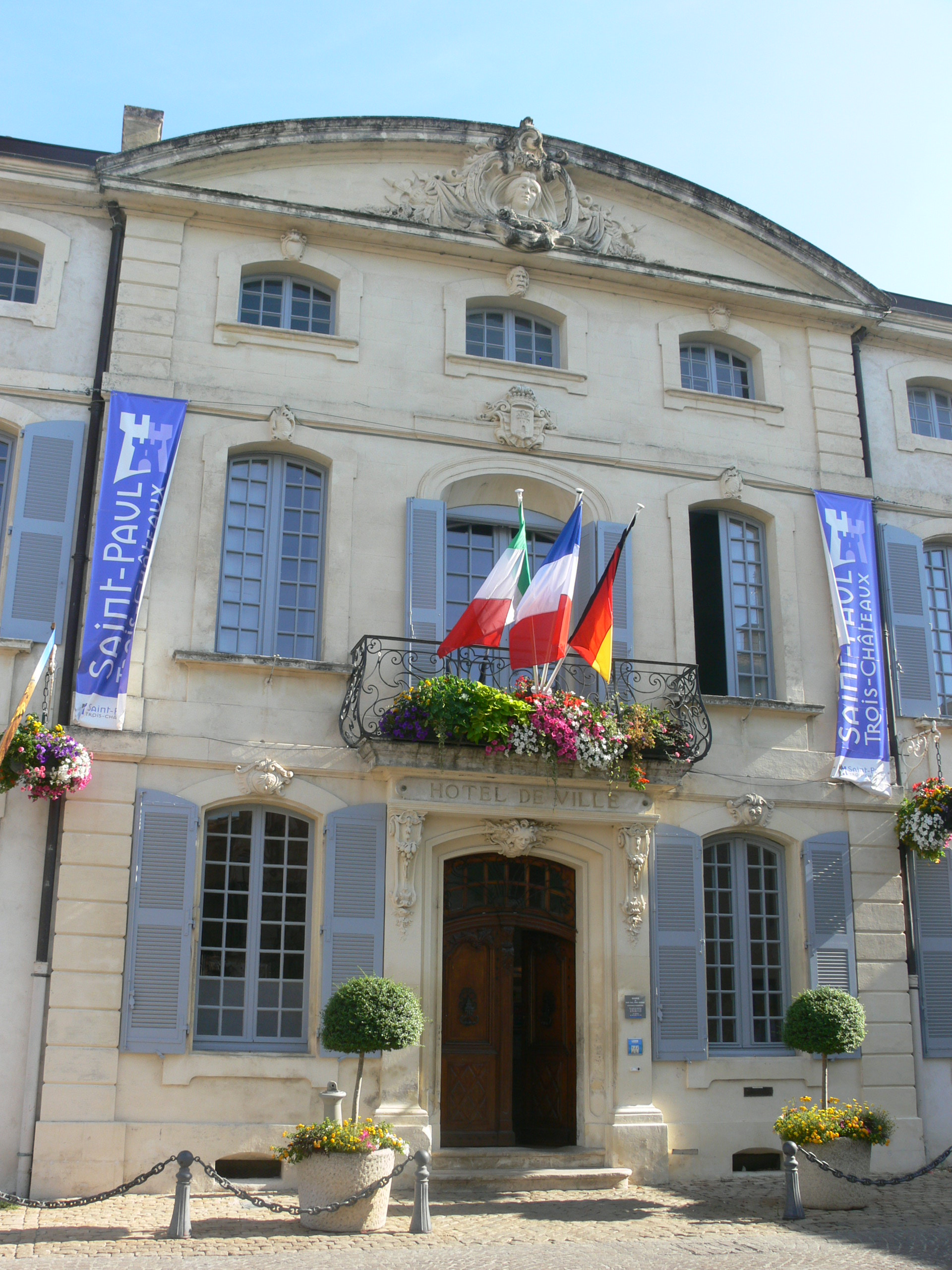 Hôtel de Castellane (désormais Hôtel de ville)